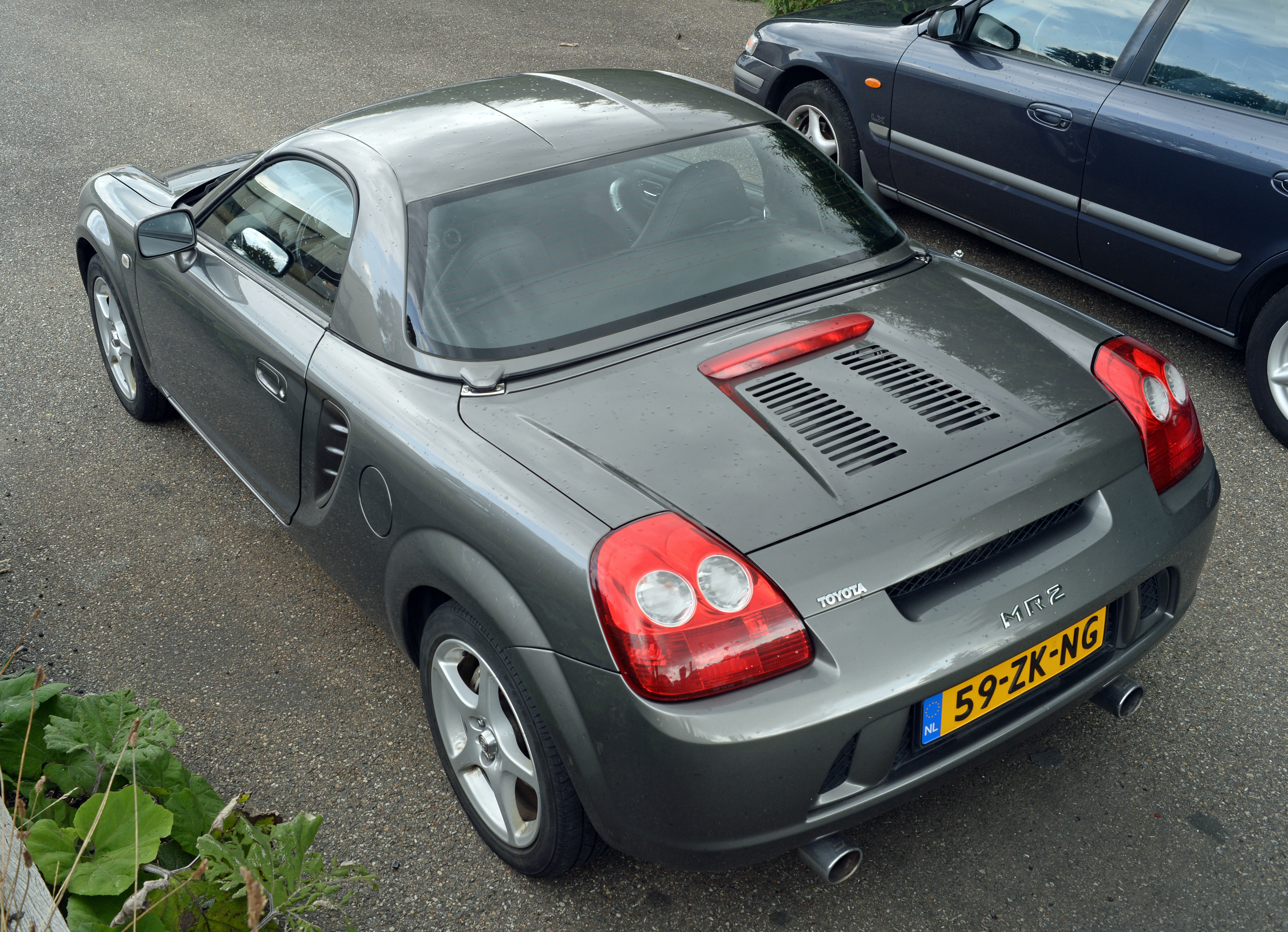 2003 Toyota MR 2